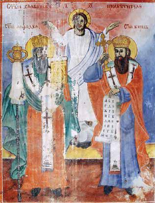 Кокре, црква Св. Архангел Михаил, св. Кирил и св. Методија, северен